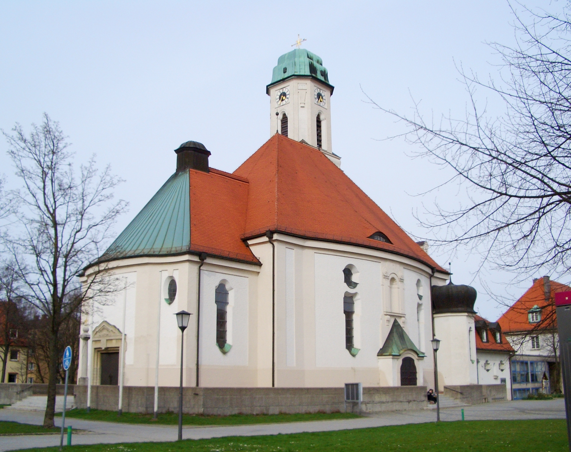 neue St. Georgskirche in Muenchen-Milbertshofen